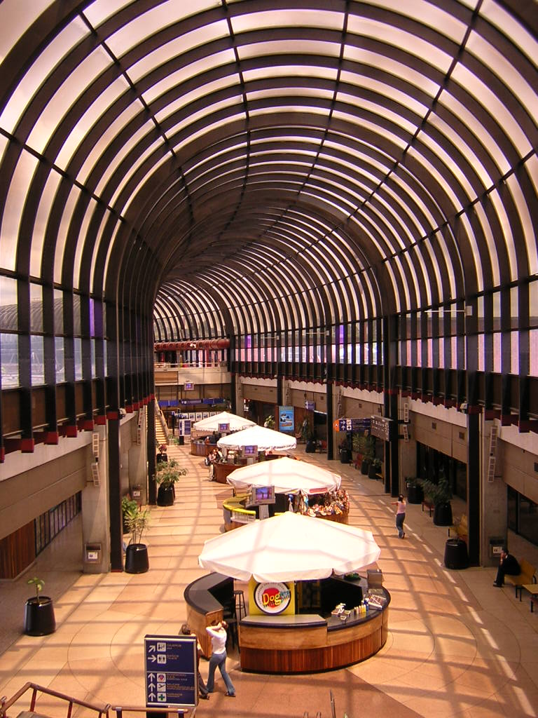 Aeropuerto Internacional Jose Maria Cordova